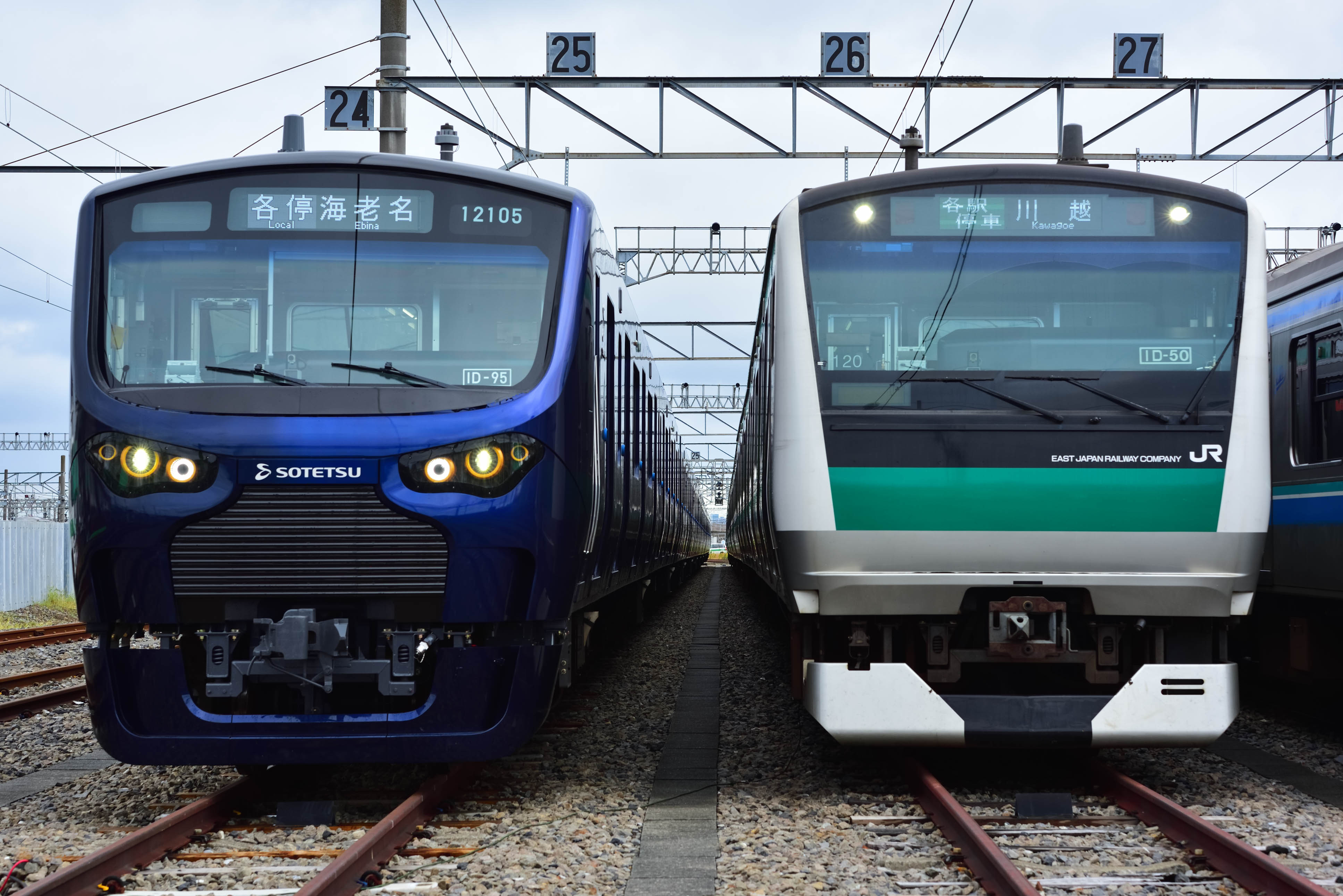 相鉄・JR直通線PRイベント。2019川越車両センター公開。